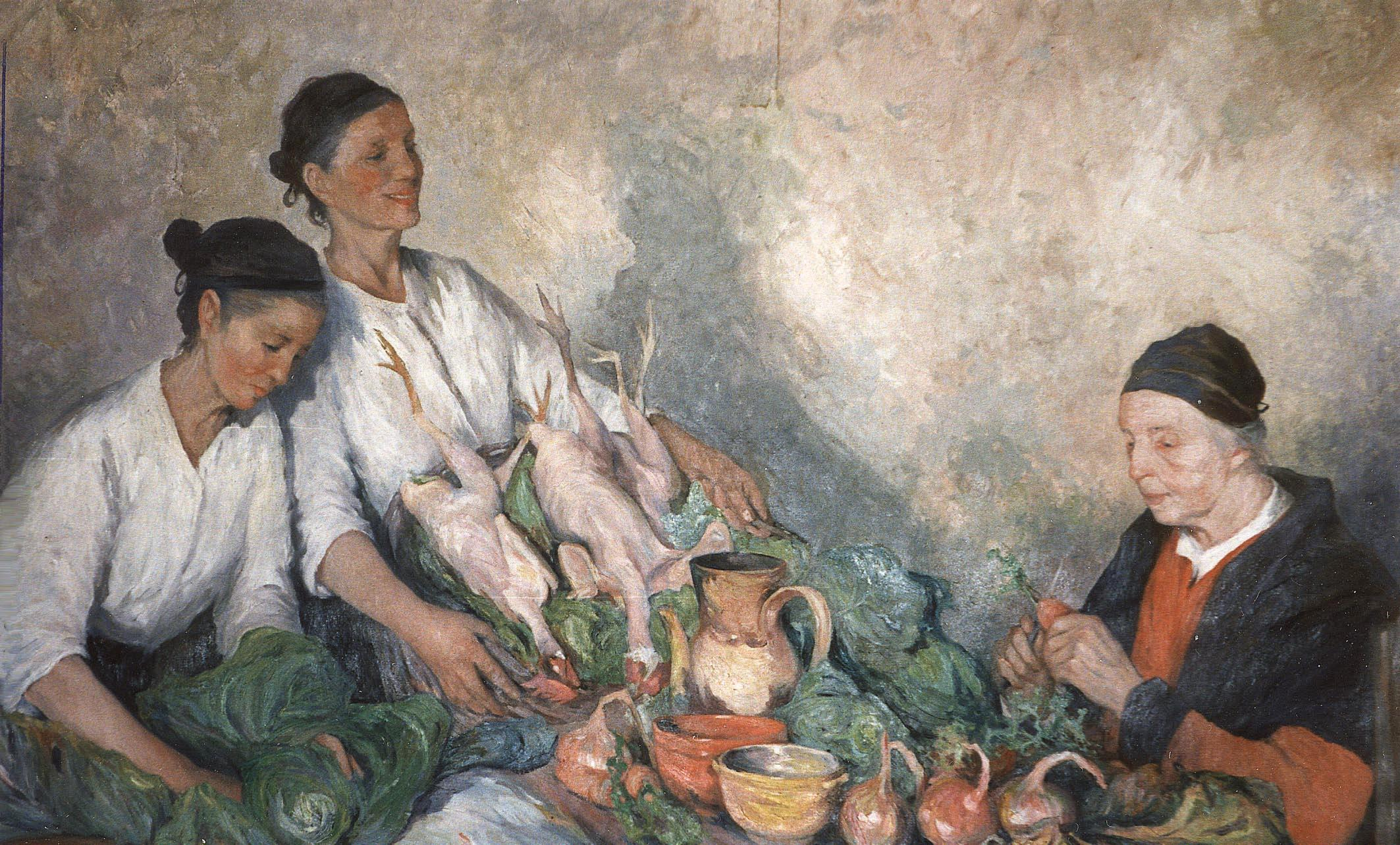 hst, 160 x 195. Musée de Cambrai